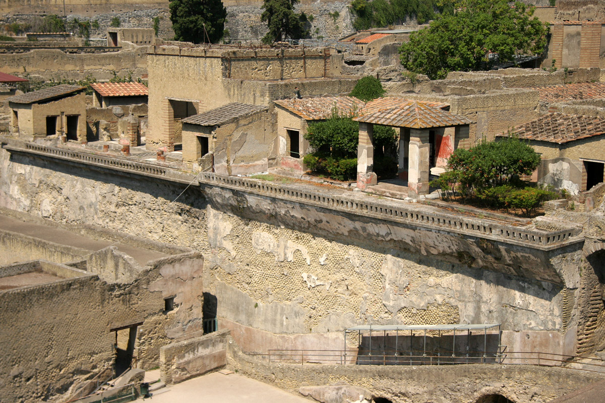 La Casa de los Ciervos, Herculano.